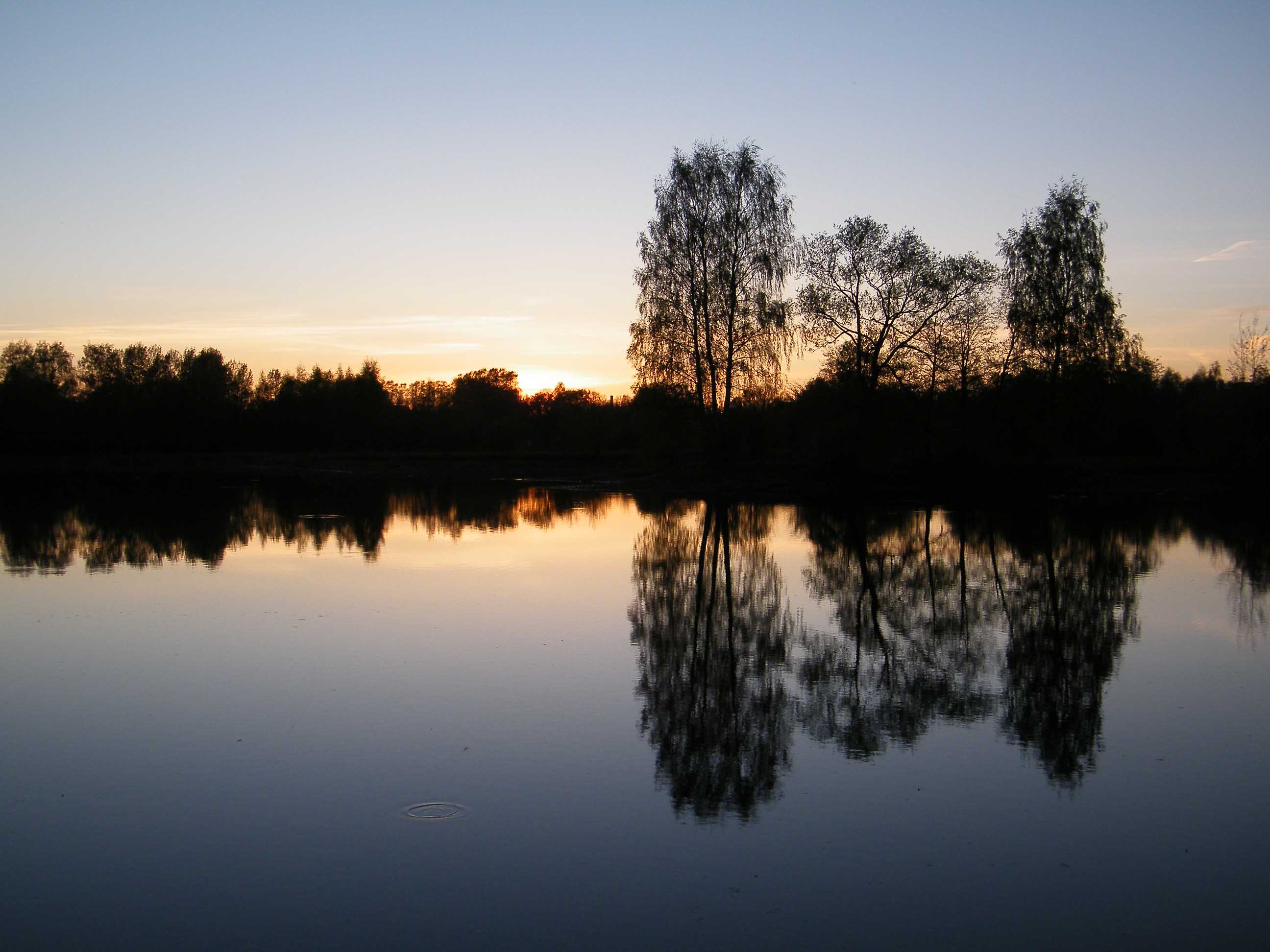 Вечер